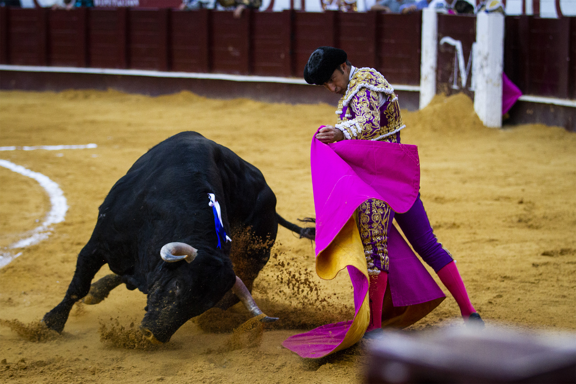 "El Fandi" toreando a la verónica en la plaza de toros de Málaga